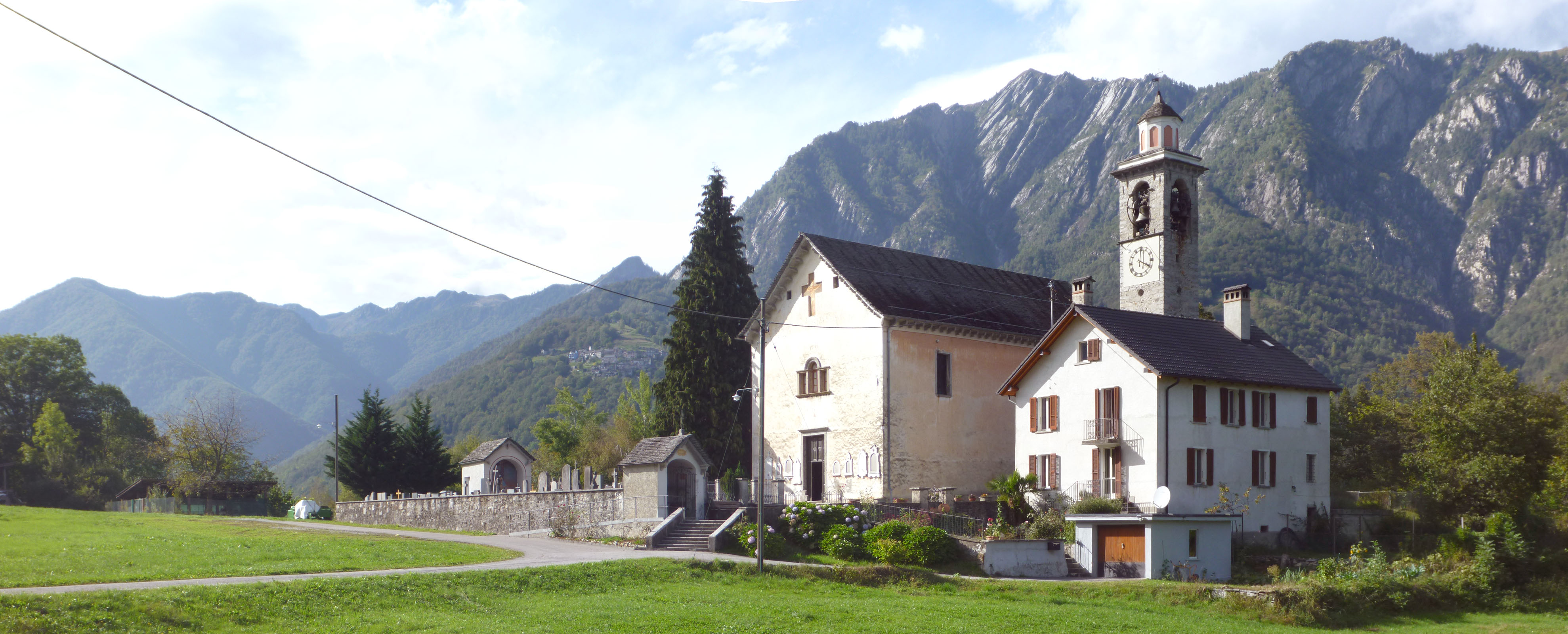 Cimitero, Chiesa parrocchiale di San Michele e casa parrocchiale a Palagnedra